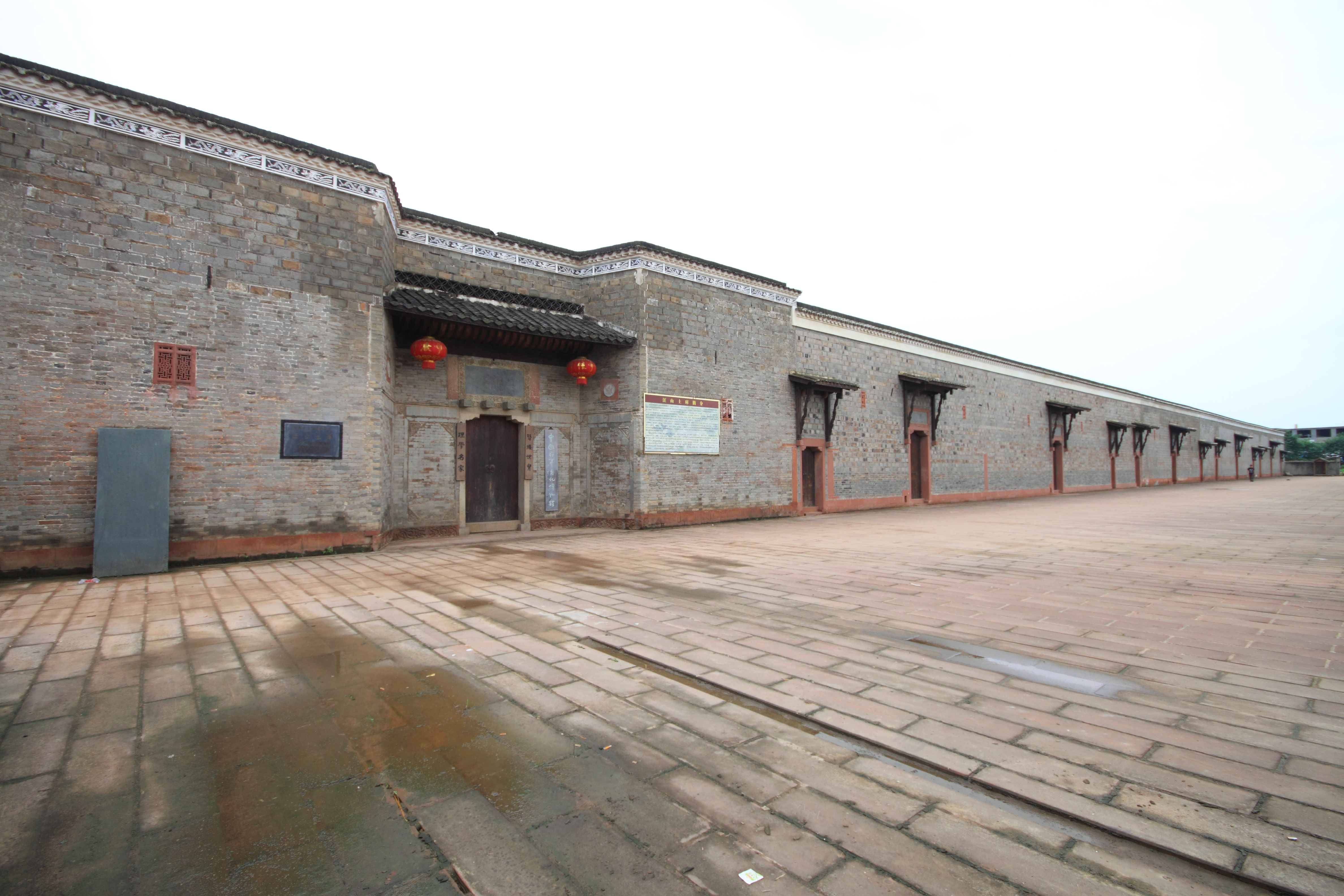 汪山土库，位于中国江西省新建县。